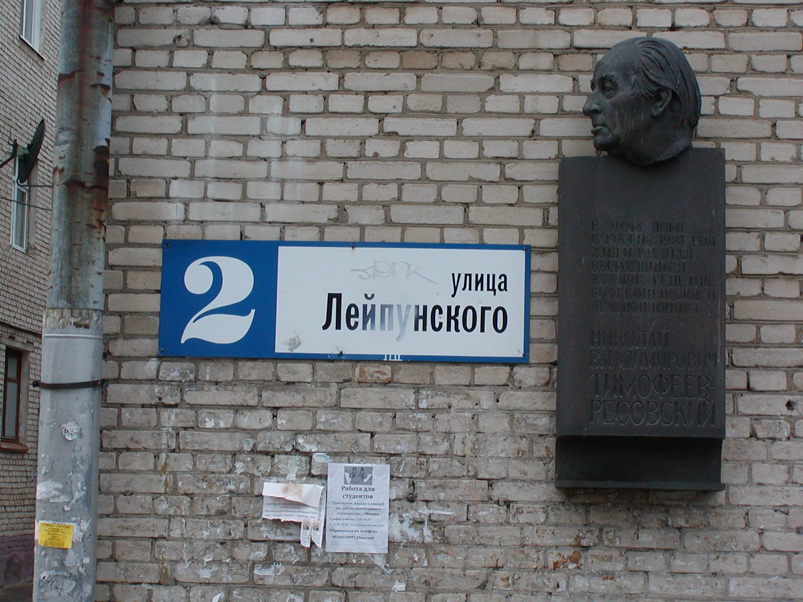 Мемориальная доска в честь Н. В. Тимофеева-Ресовского на доме, в котором он жил в Обнинске.